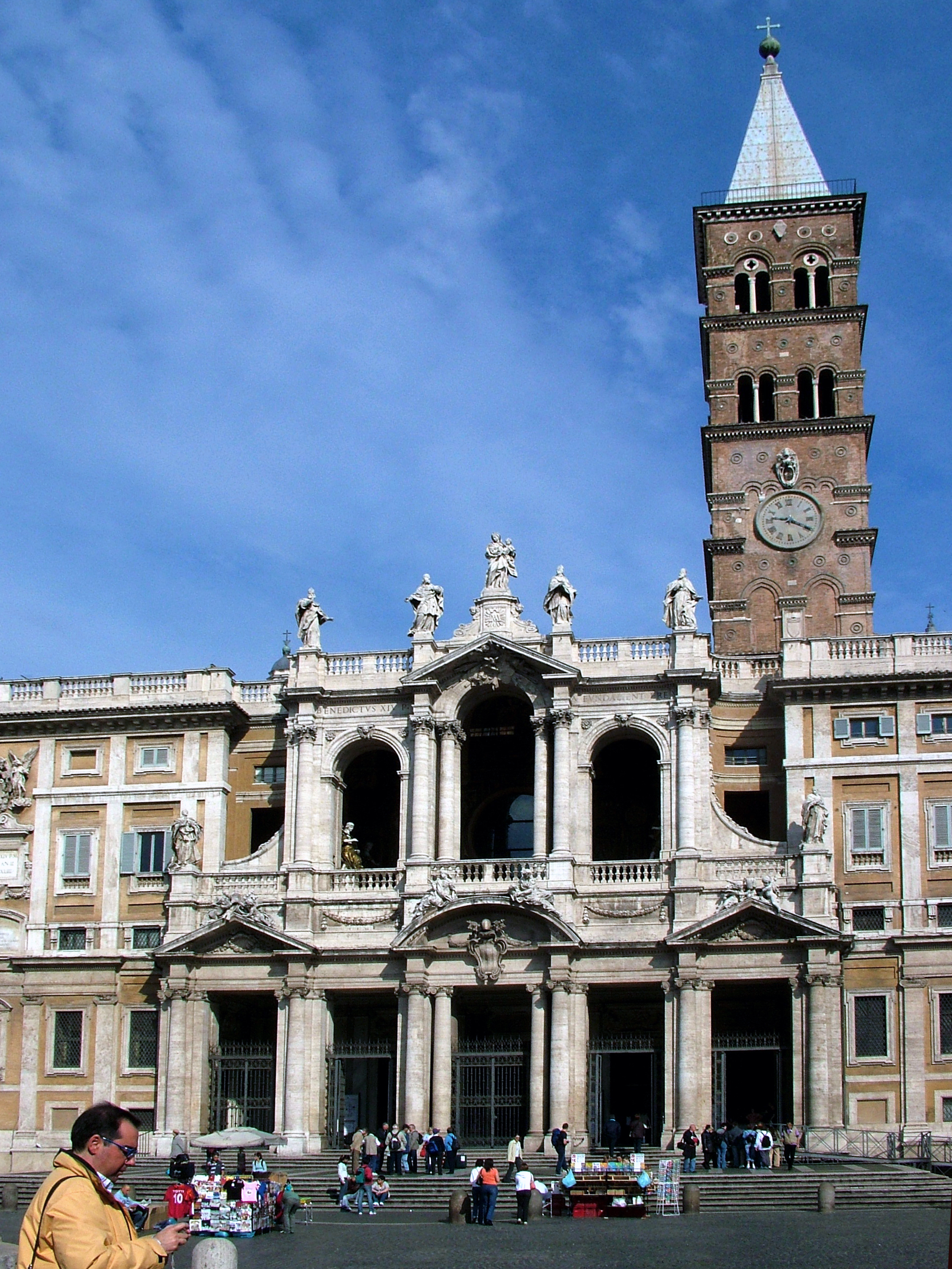 Róma, Basilica di Santa Maria Maggiore, a főhomlokzat